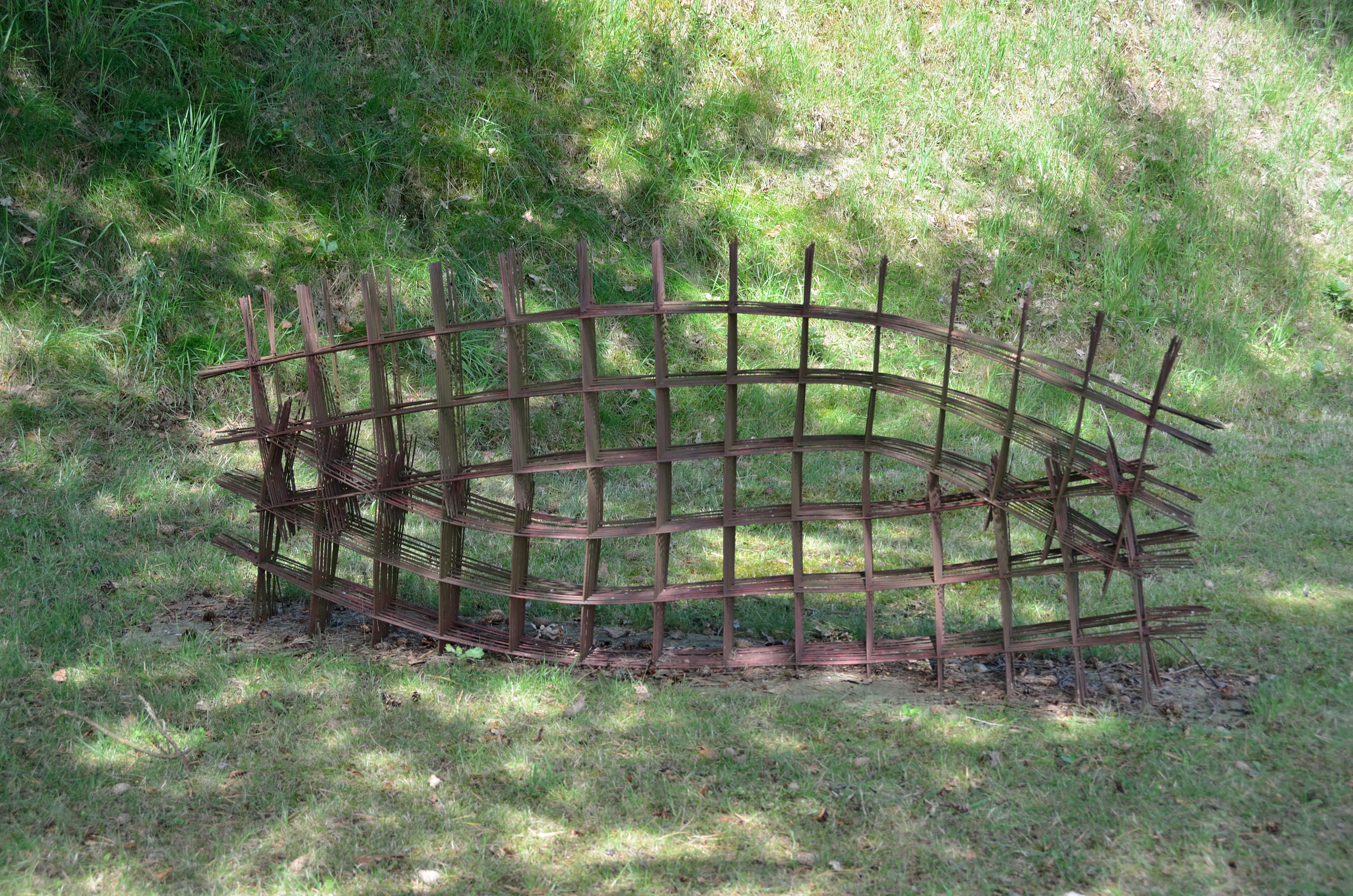 o.T. von Carmen Perrin im Österreichischen Skulpturenpark in Premstetten / Kalsdorf bei Graz. Die Skulptur stammt aus dem Jahre 1990.